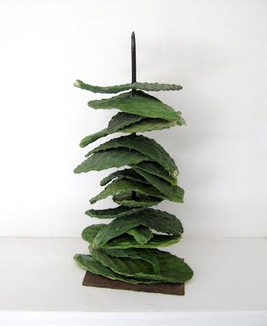 Final Notice. 2009 עבודה מתכלה – עלי צבר, ברזל 16 / 12 / 24 ס"מ צילום העבודה ליווה את מאמרה של ד"ר יעל שטרנהל, שפורסם במוסף של הקרן החדשה לישראל, אשר צורף לעיתון הארץ בערב יום כיפור 2013 .